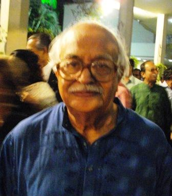 জিল্লুর রহমান সিদ্দিকী